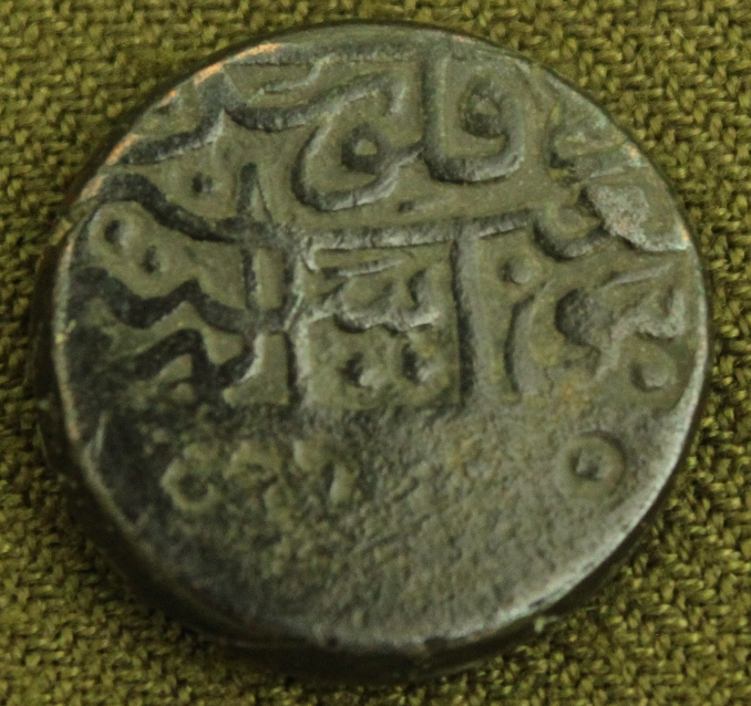 Нахичевань (феодальное владение) 1578 год.